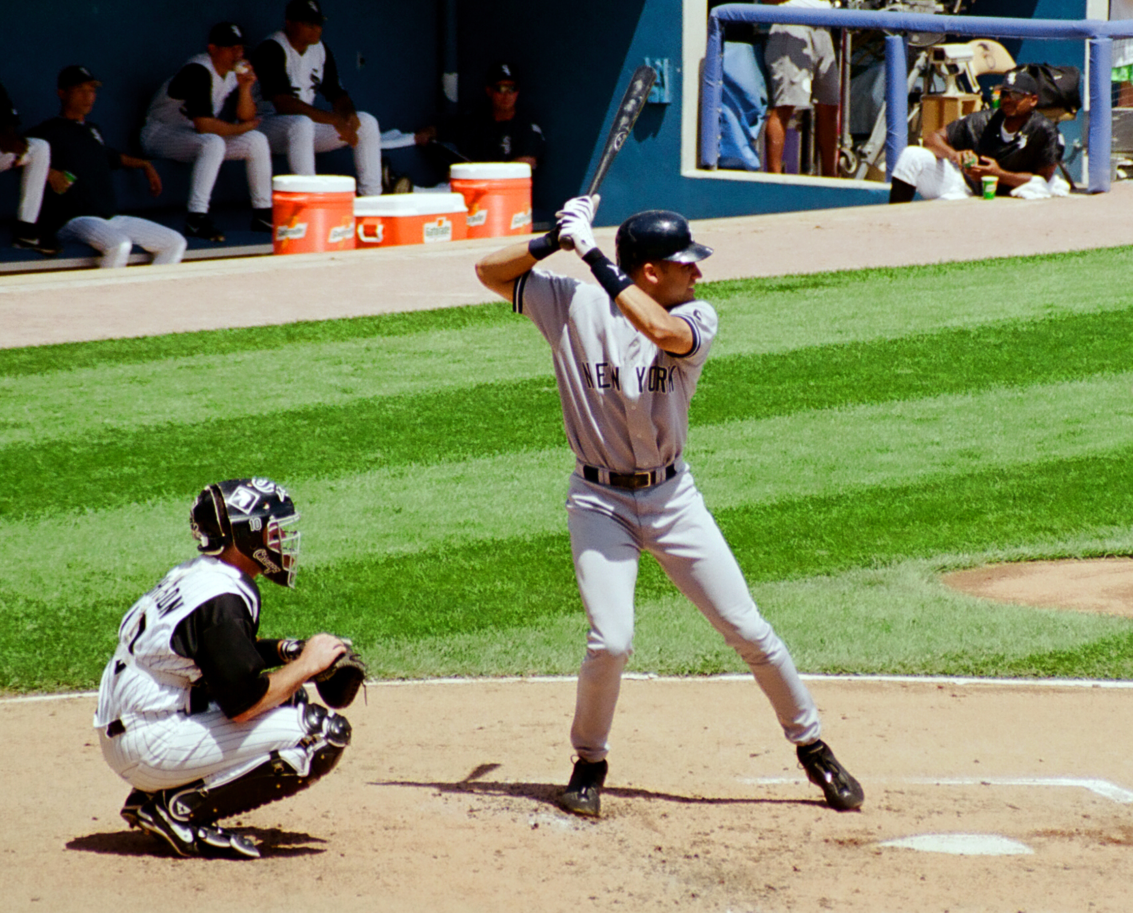 Derek Jeter bats at New Comiskey Park, 1999.